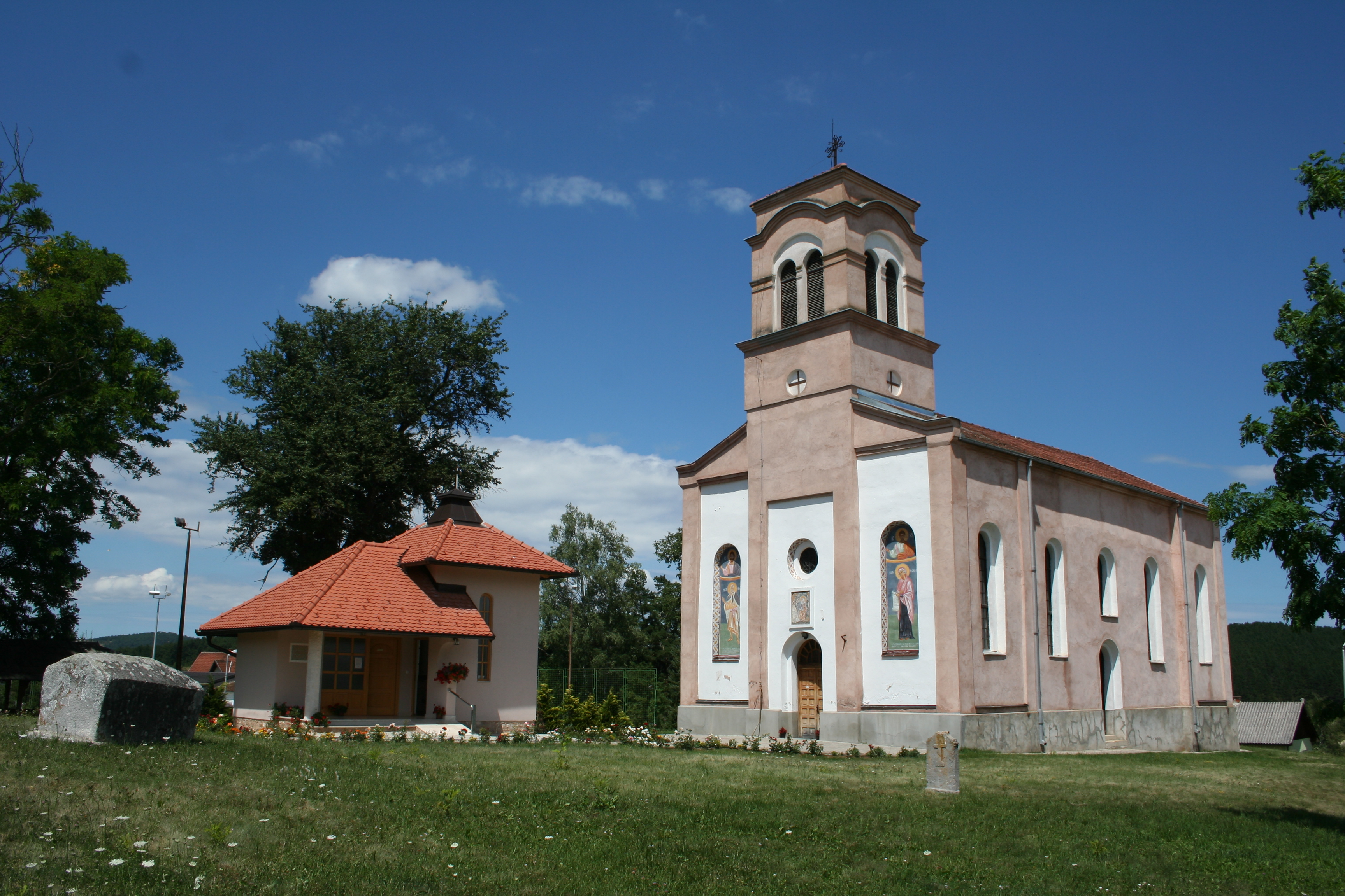 Crkva Sv. proroka Ilije u Mačkatu